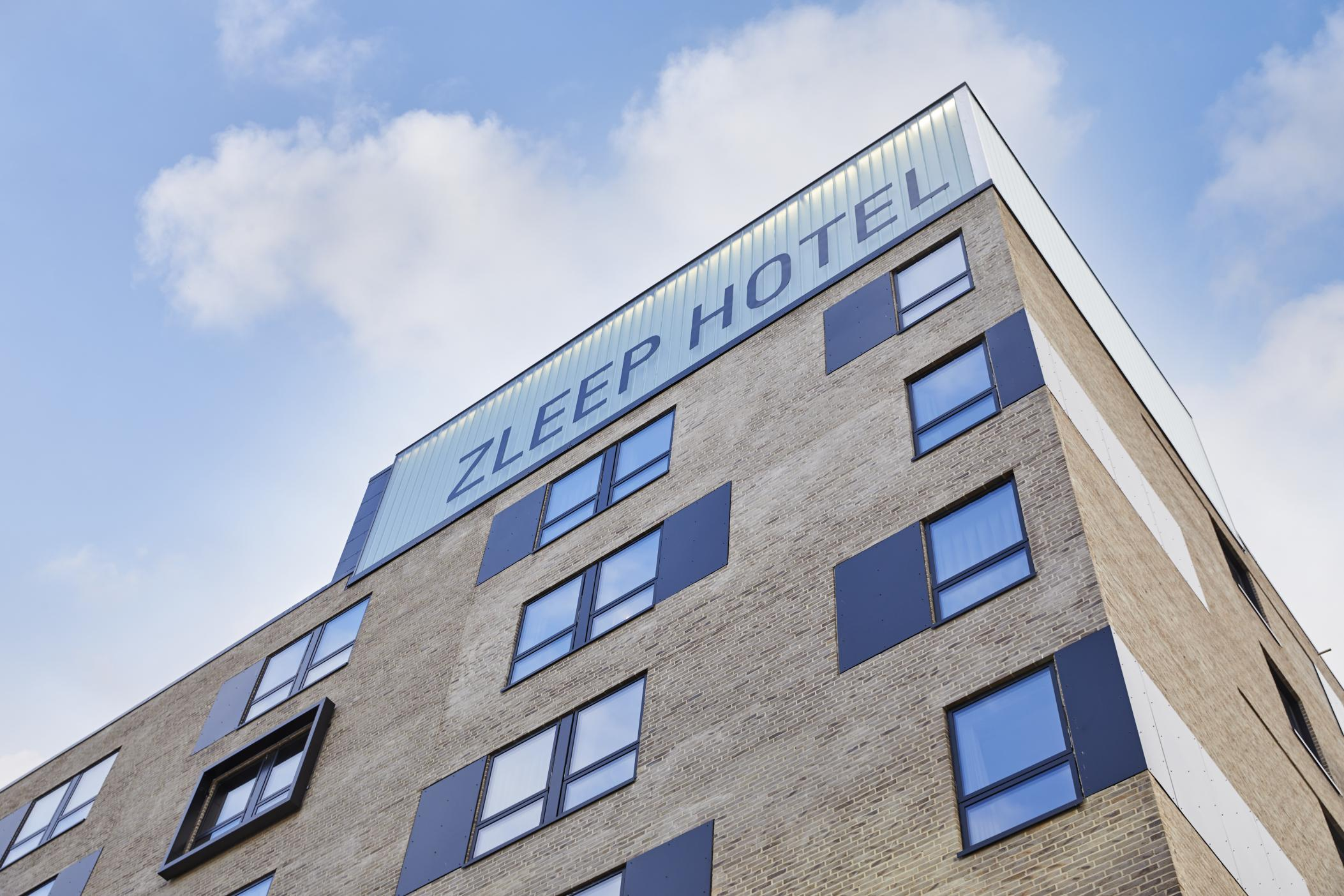 Zleep Hotel Aalborg